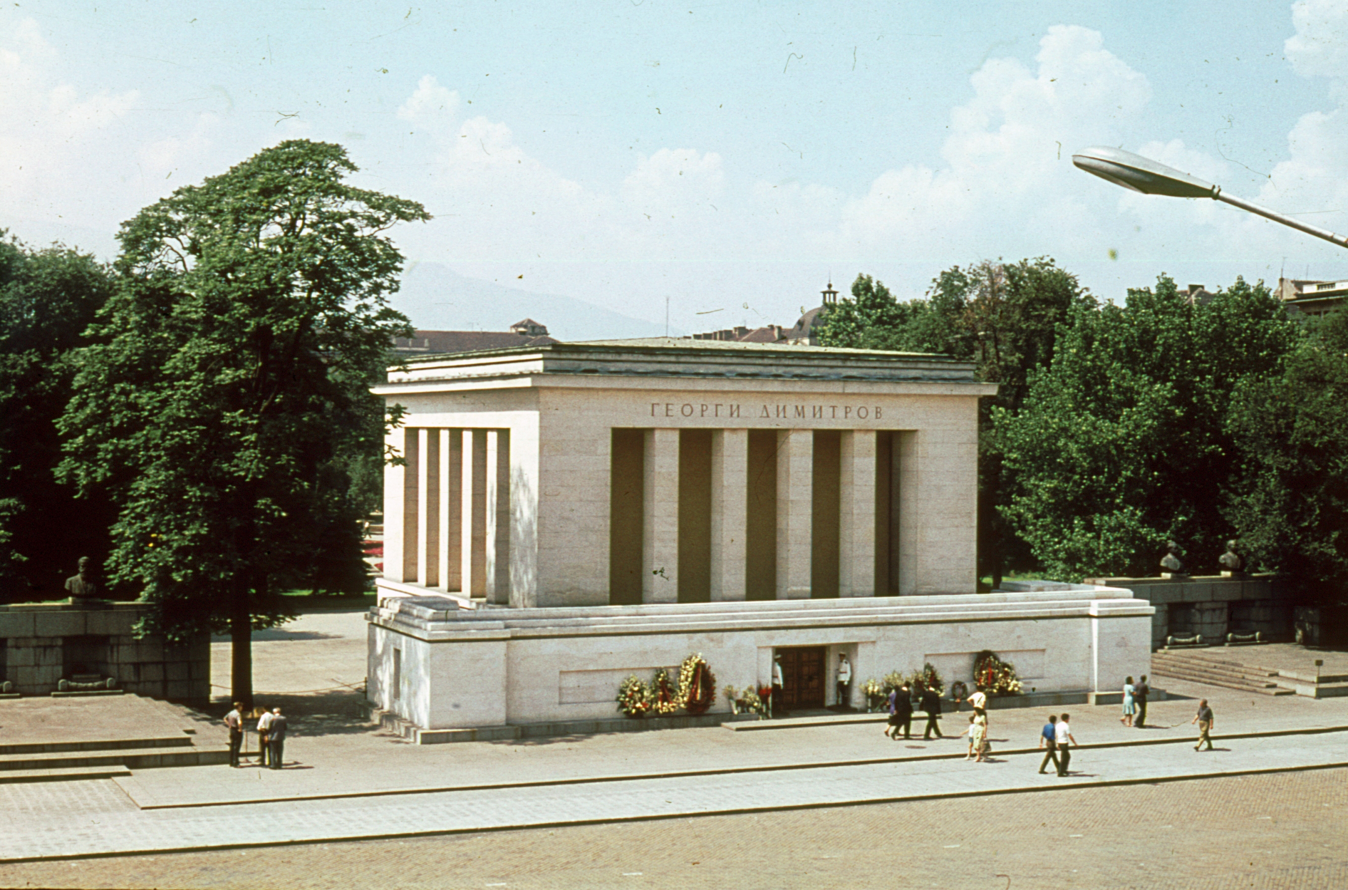 Georgi Dimitrov mauzóleuma. Location: Bulgaria, Sofia Tags: colorful, mausoleum Title: Georgi Dimitrov mauzóleuma.